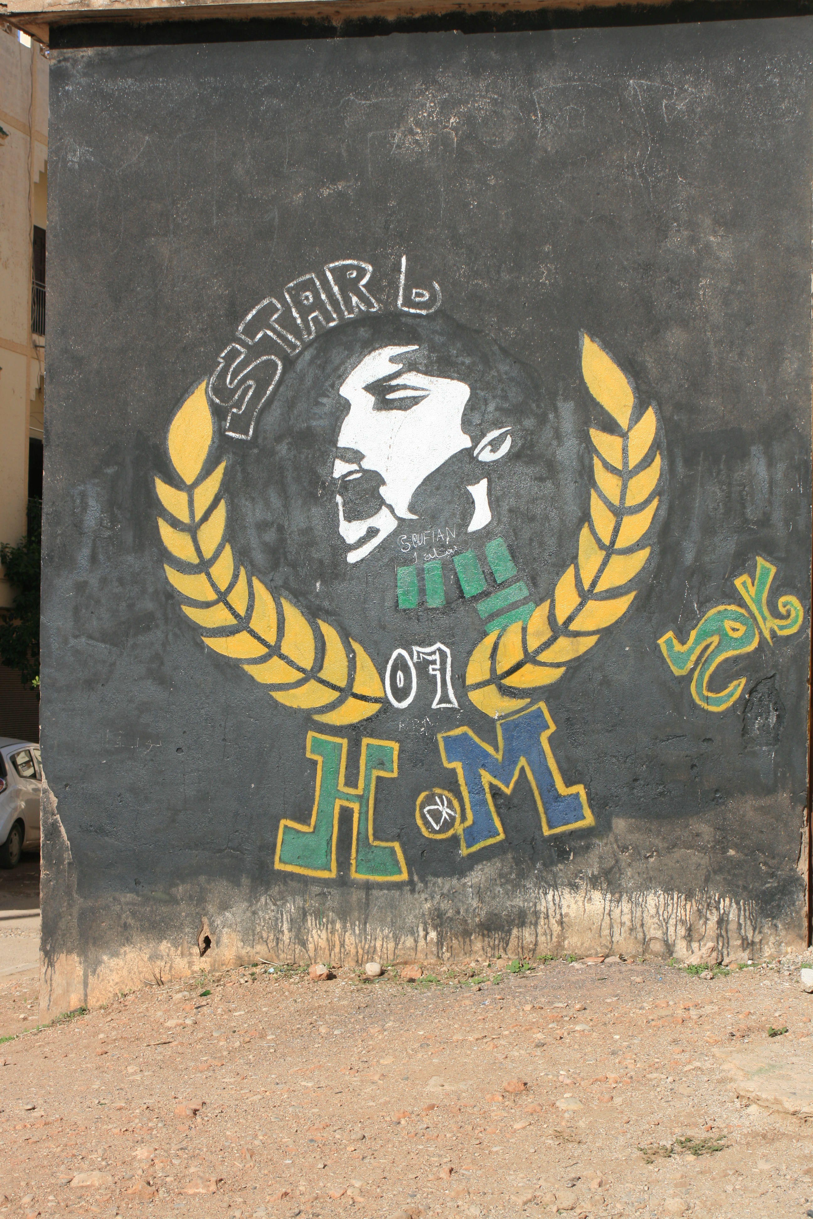 Star boys Quartier Oum Dahr